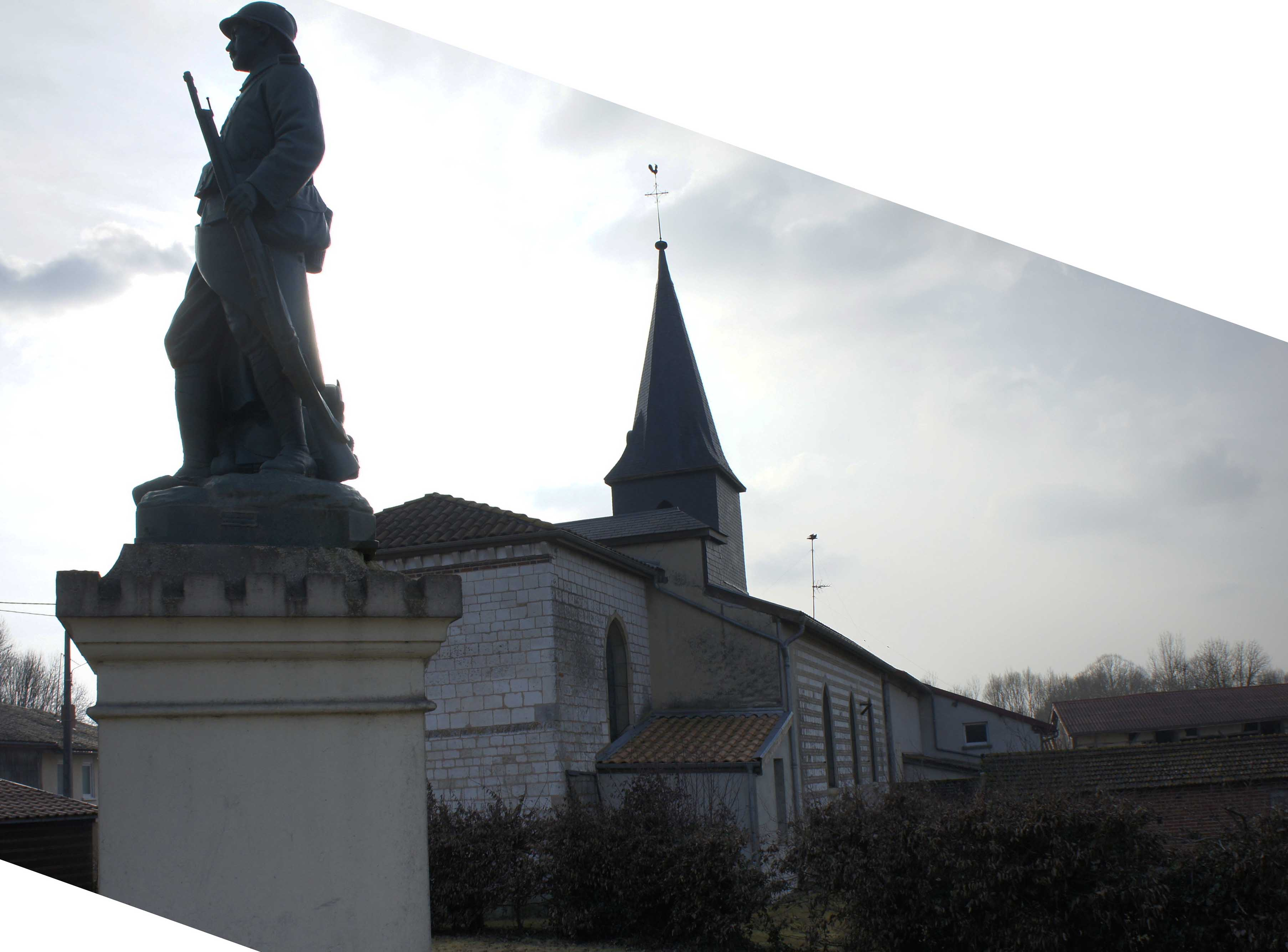 Dampierre le Château, vue du monument aux morts et de l'église.